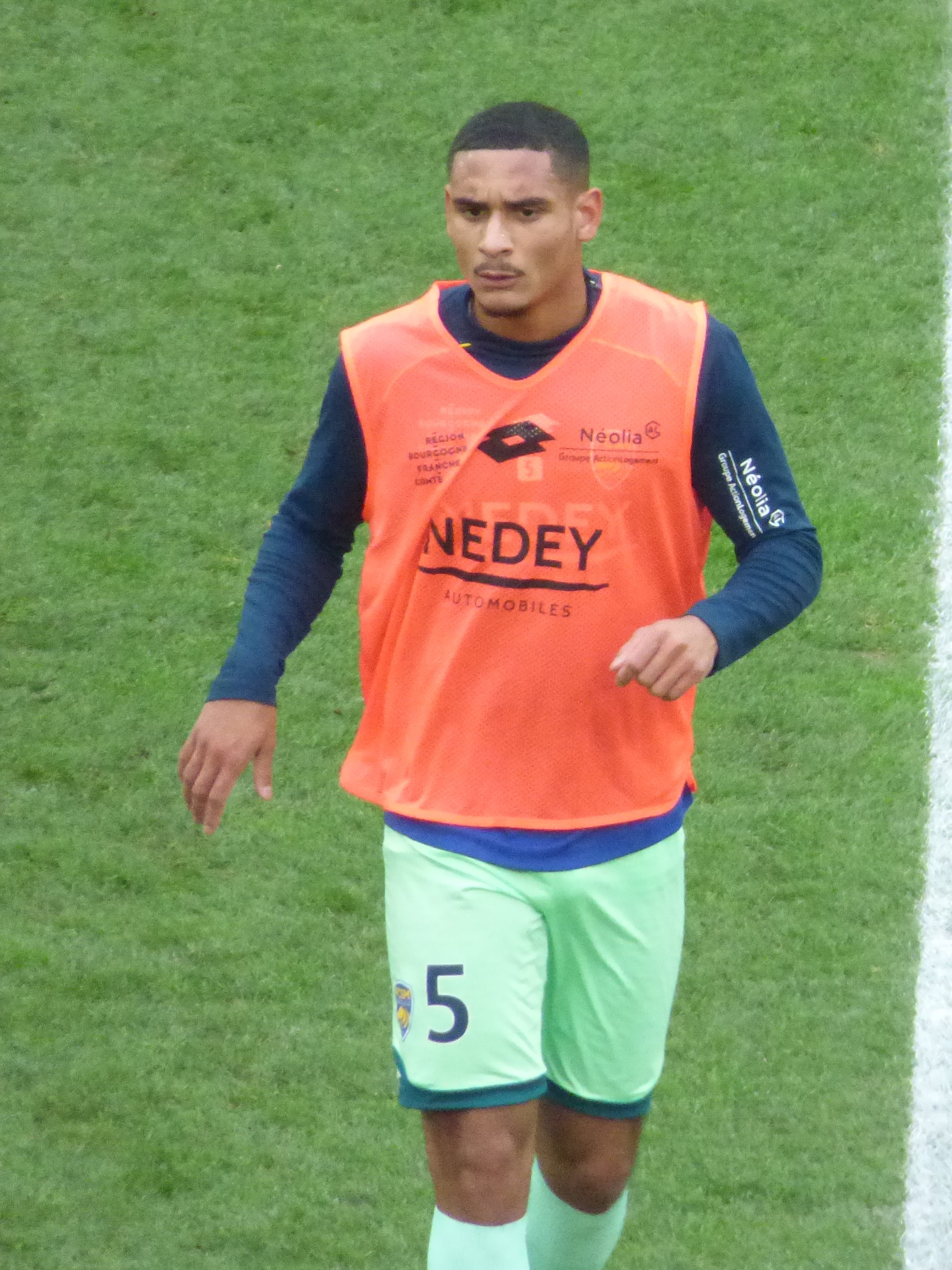 Maxence Lacroix avant le match RC Lens / FC Sochaux, comptant pour la quinzième journée du championnat de France de Ligue 2 de football 2019-2020, le 23 novembre 2019, au Stade Bollaert-Delelis.